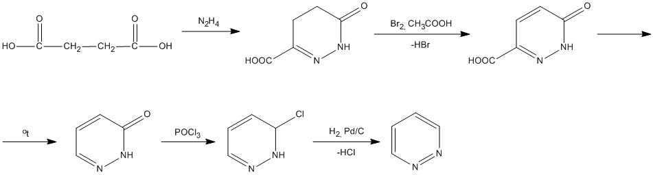 Piridazin 1